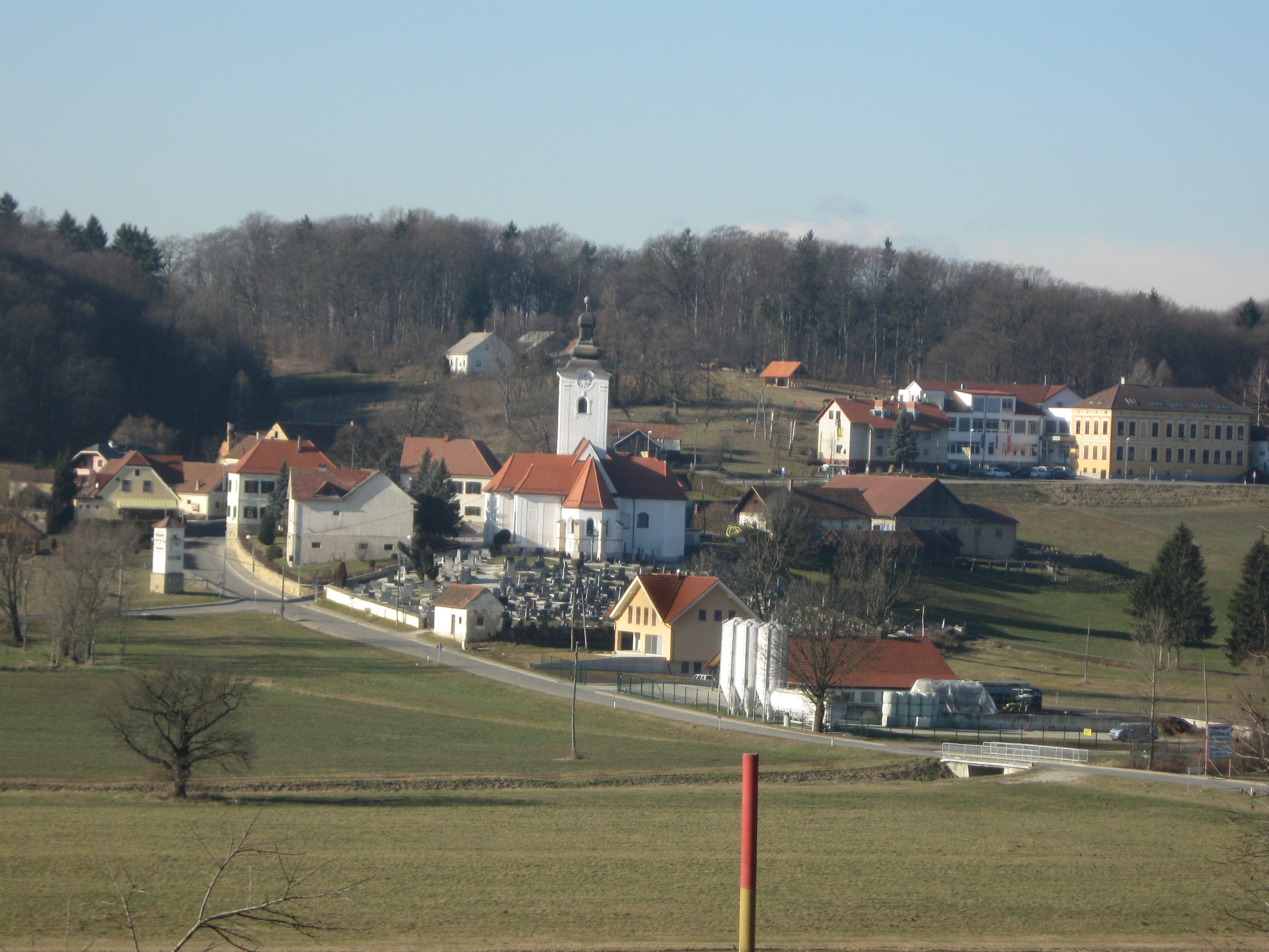 Naselje Jurovski Dol v Slovenskih goricah.